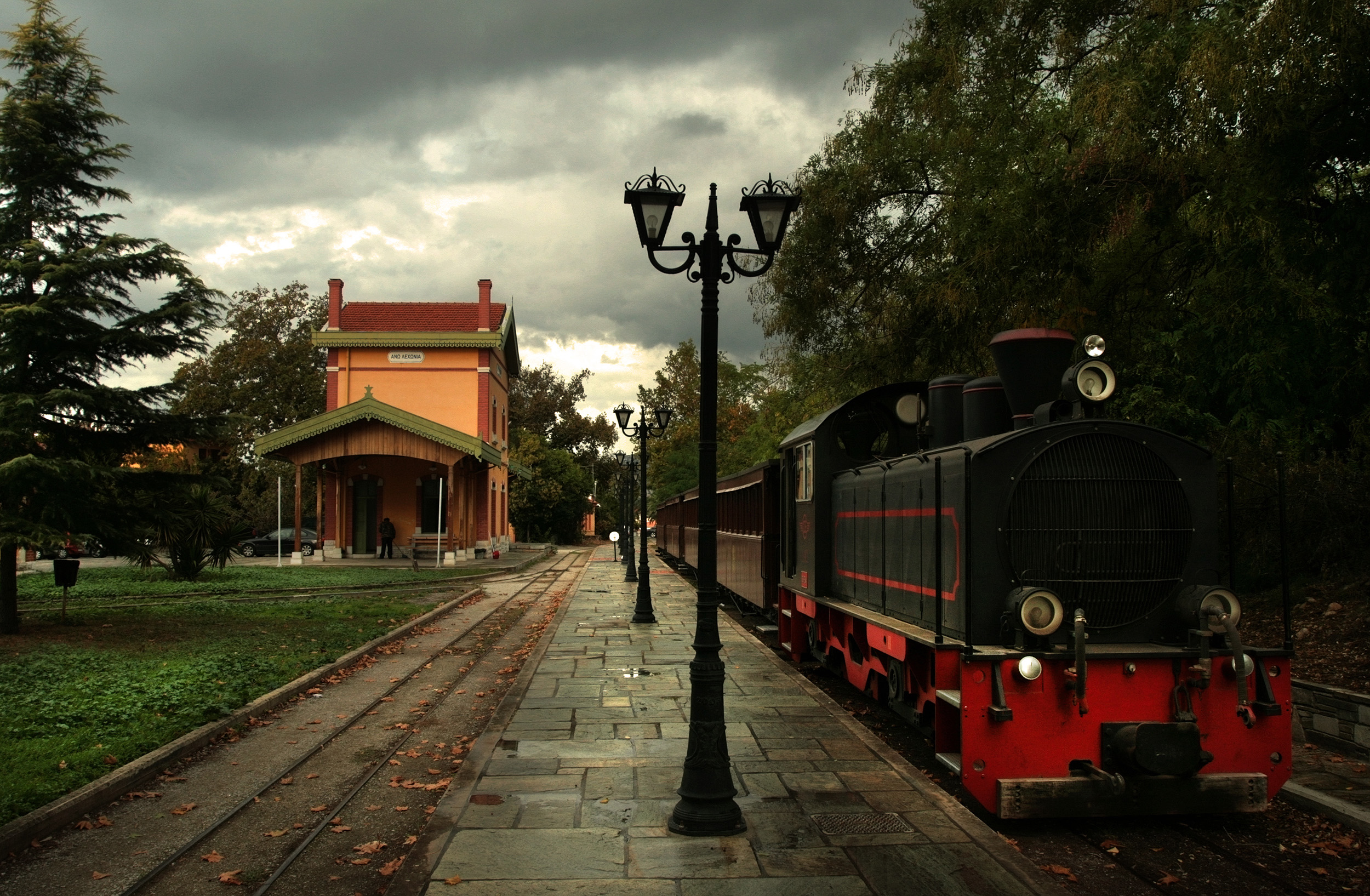 Τρενάκι Πηλίου«Τρενάκι Πηλίου»